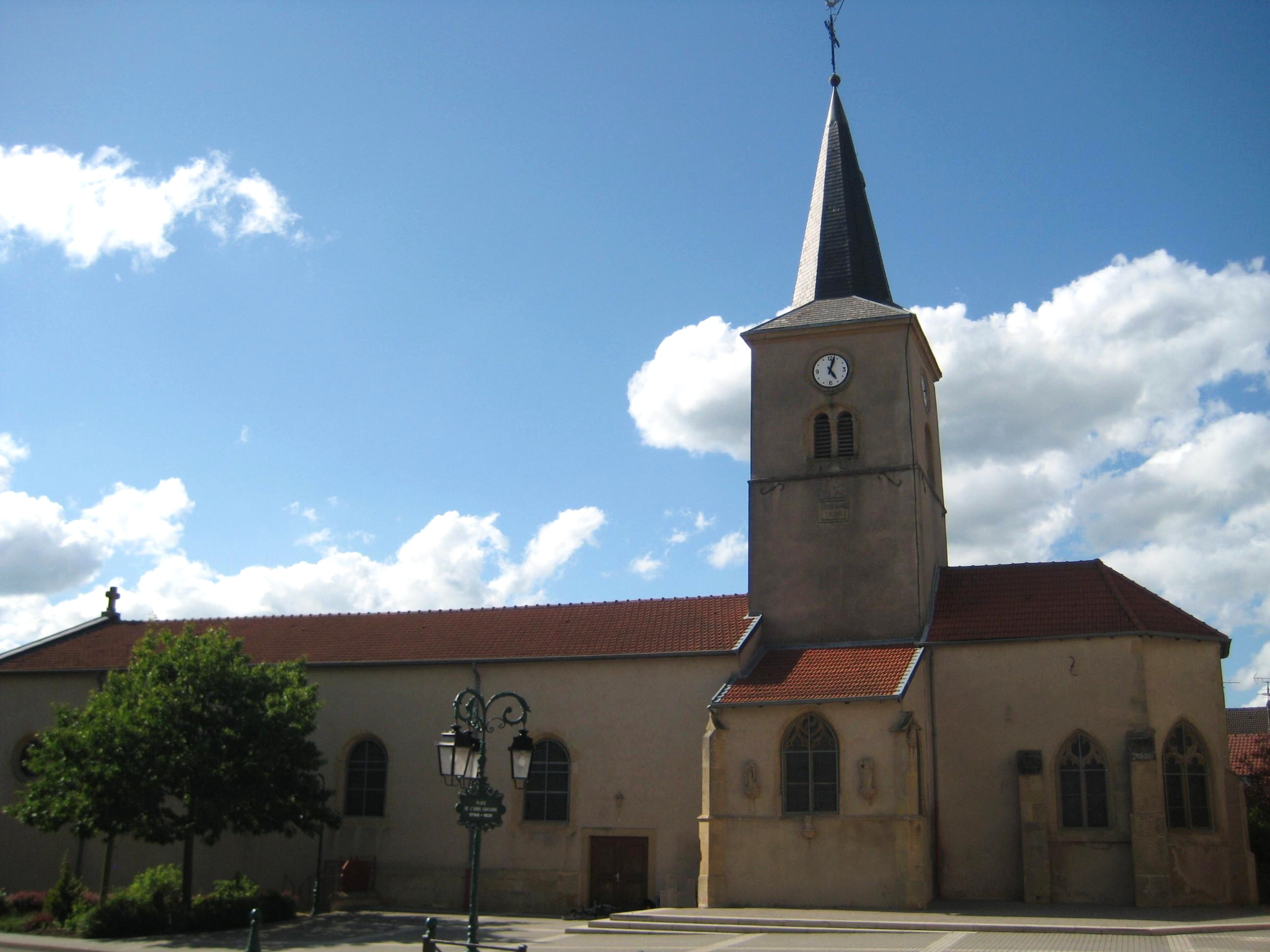 Église Sainte-Marie